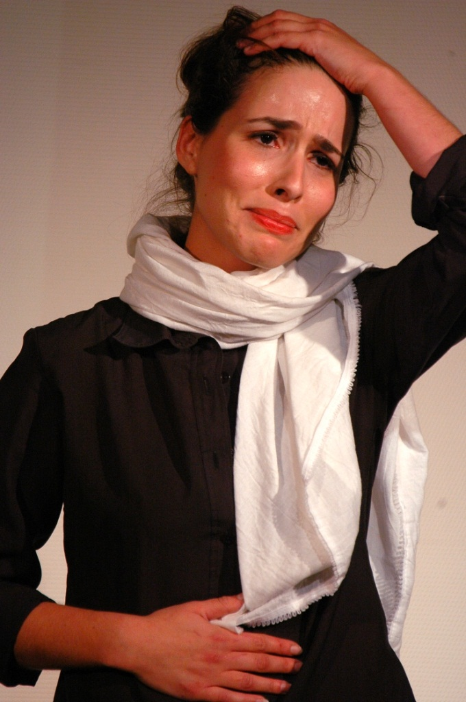 איילת רובינסון ב"ותו לא" מאת אייל וייזר בתיאטרון תמונע